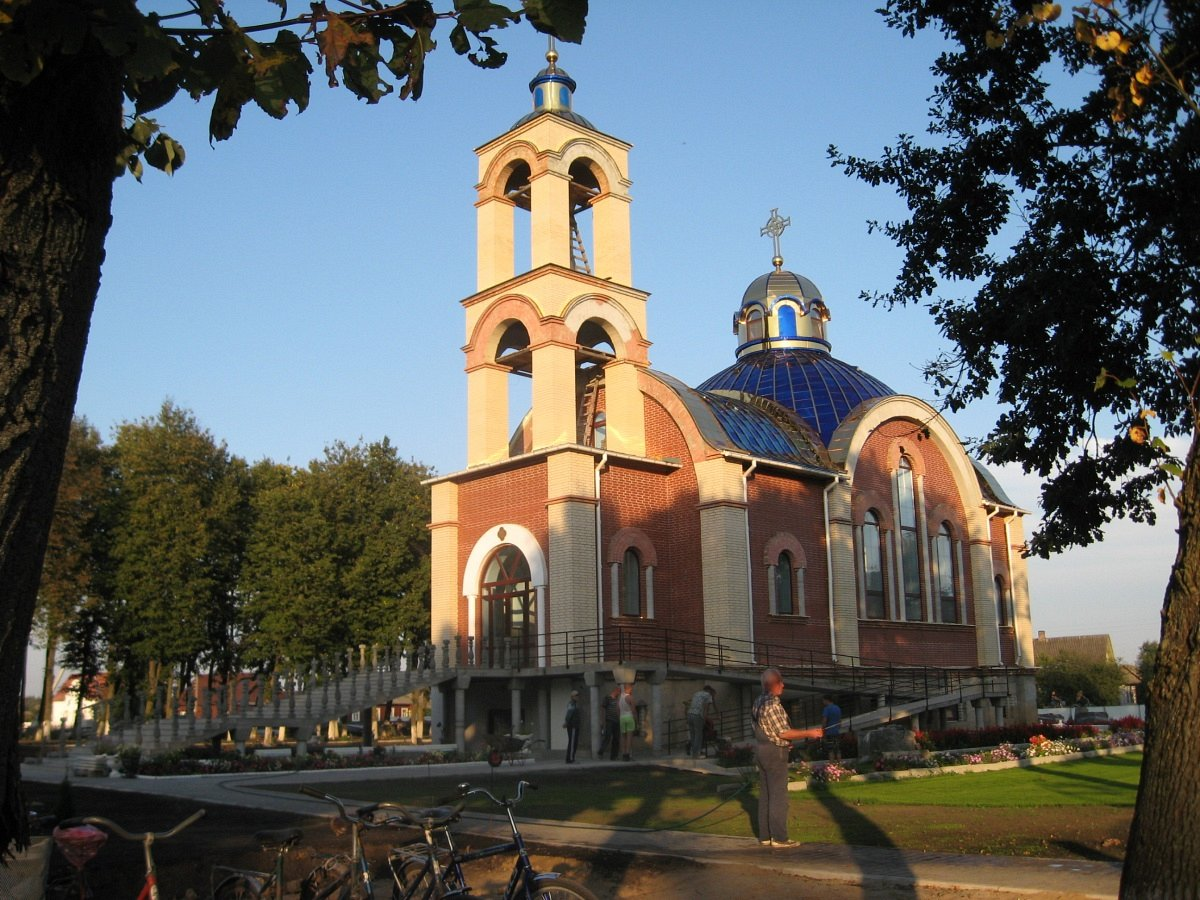 Яглевічы. Царква